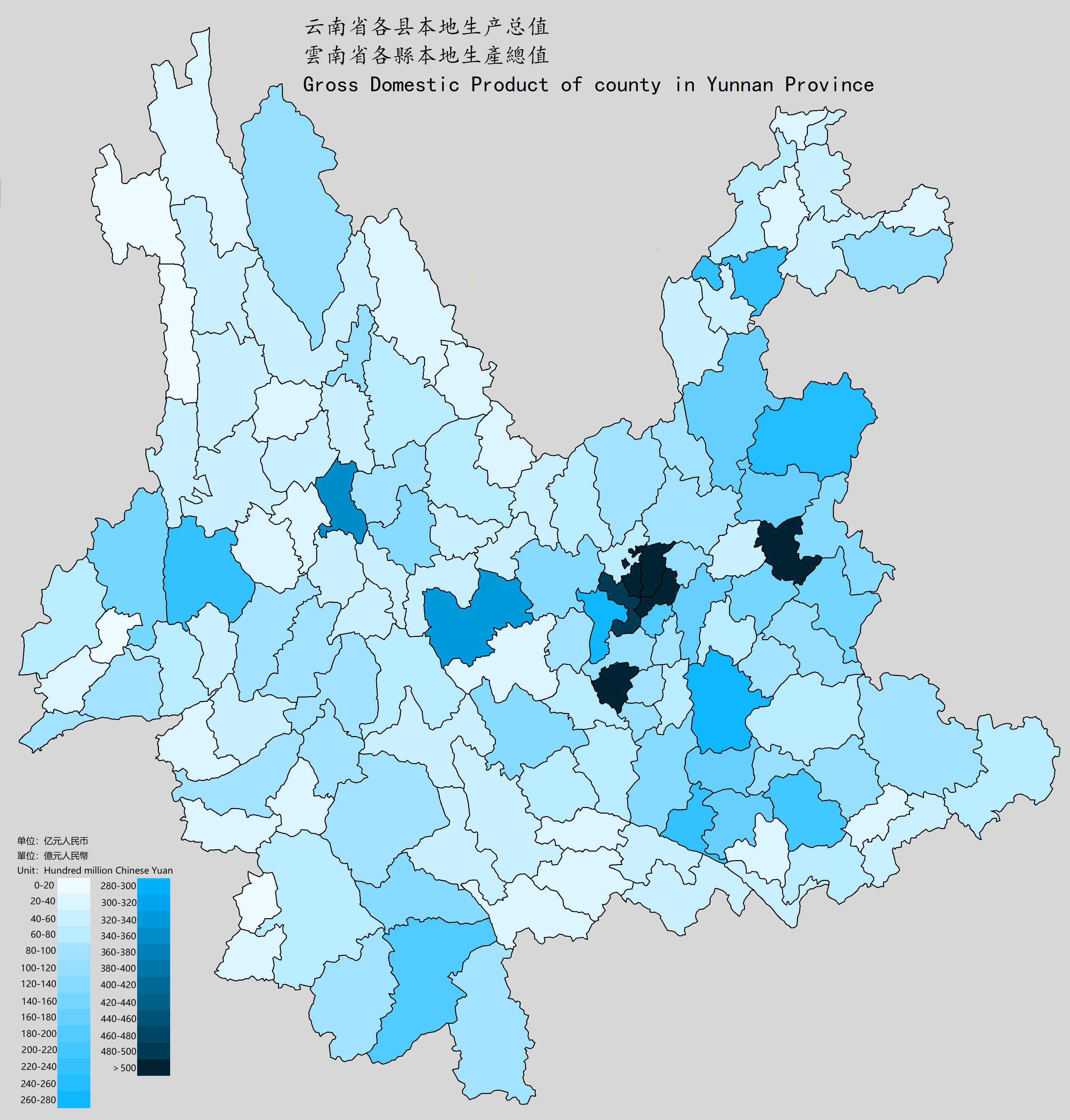 中文（中国大陆）: 云南省各县GDP总量